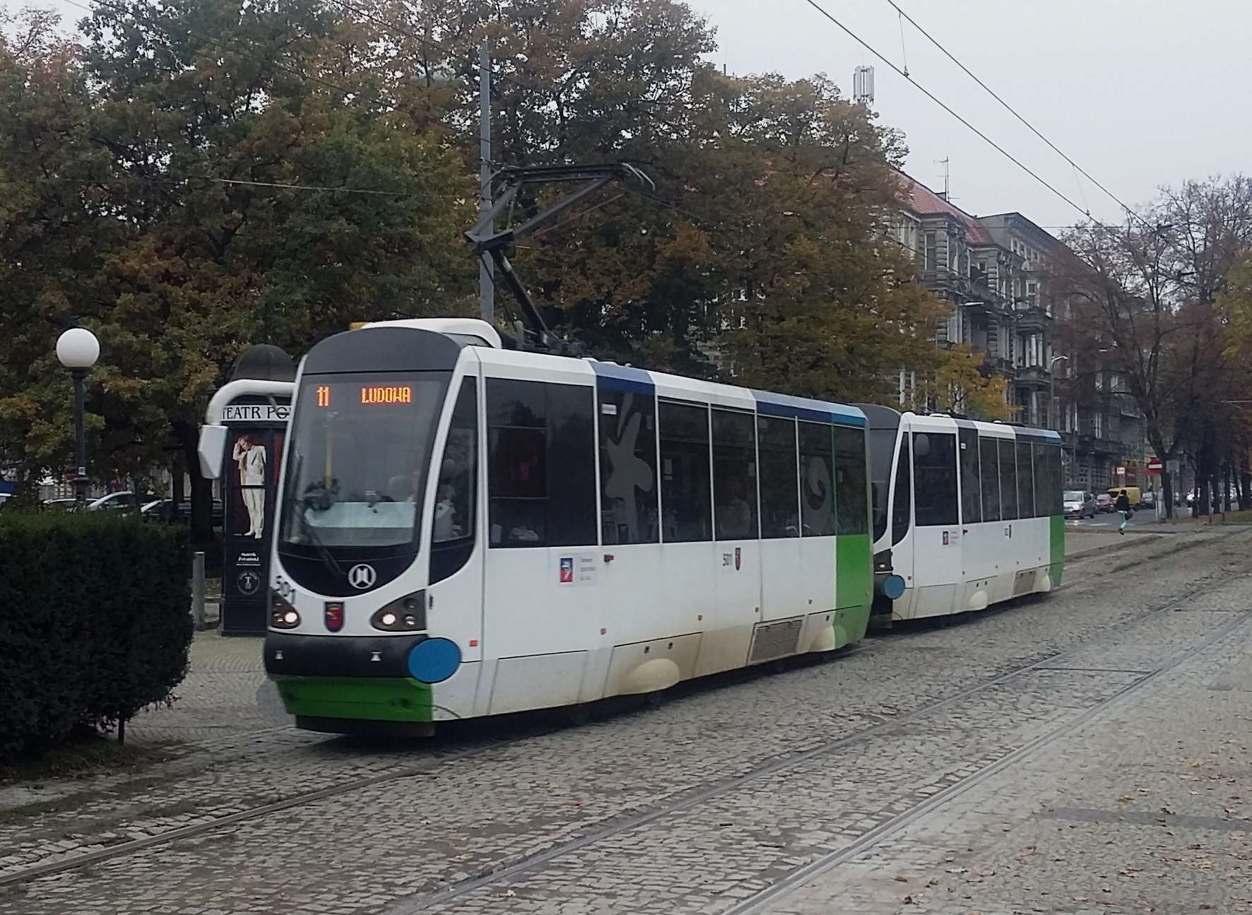 Moderus Alfa HF 09 w Szczecinie